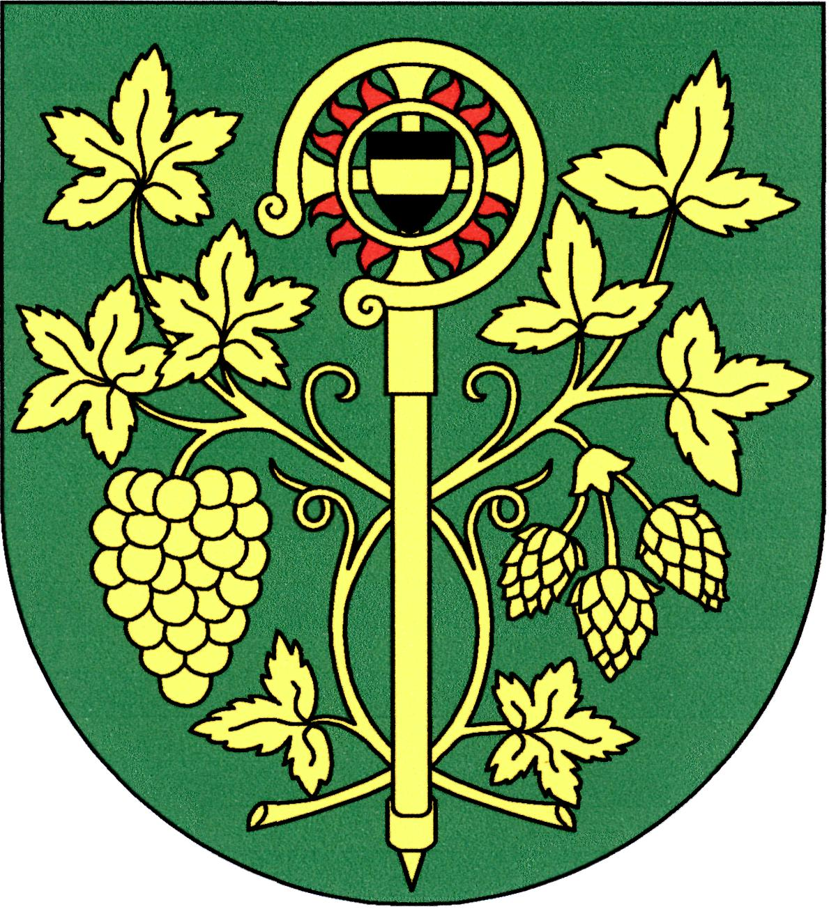 Znak obce Blšany u Loun